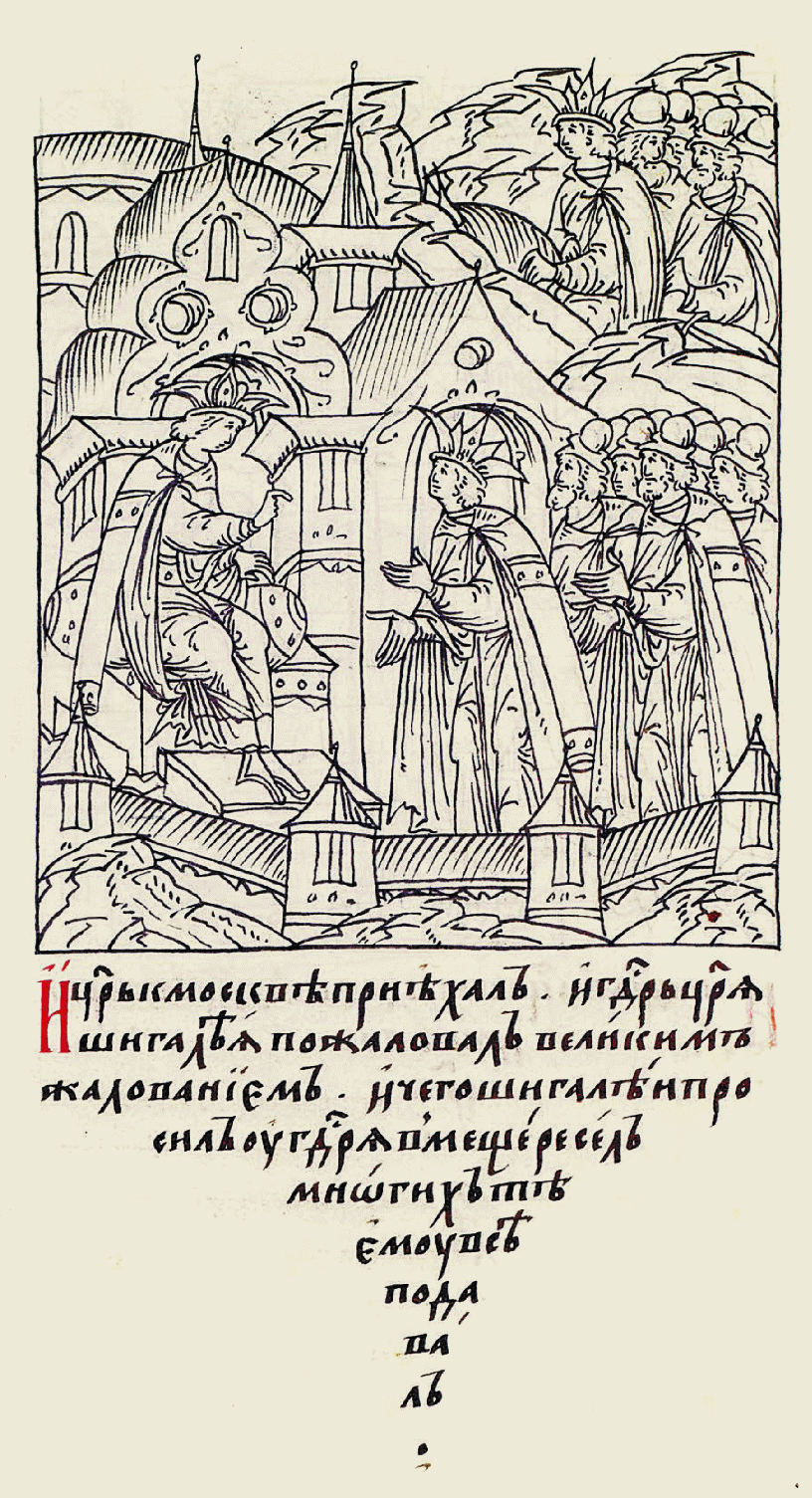 Миниатюра Лицевого летописного свода XVI в.: И царь приехал в Москву, и го- сударь царя Шигалея пожаловал великим жалованием, и Шигалей просил у государя многие села в Мещере, и все ему дал государь